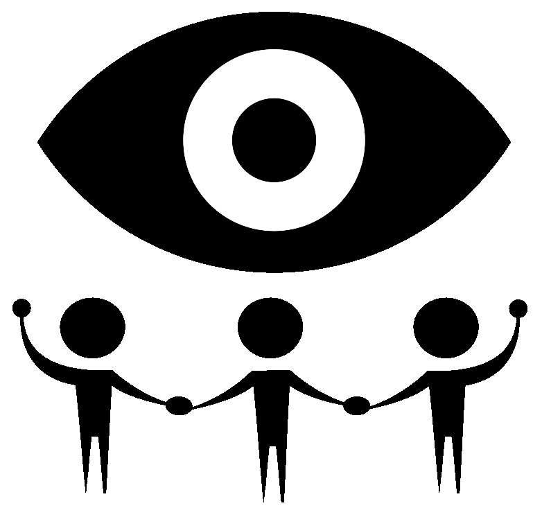 13 Principios Necesario y Proporcional